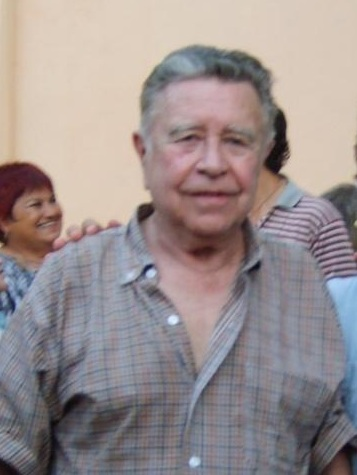 Santiago Polvos acompañado del Maestro Felgueres en una presentacion.